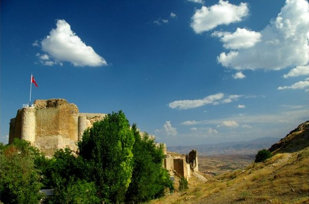 HARPUT KALESİ (SÜT KALESİ) EFSANESİ Harput Kalesi'nin bir adı da Süt Kalesi'dir. Bu kaleye Süt Kalesi denmesinin ilginç bir hikayesi vardır. Kalenin temelleri atılır. Kale duvarları yükselmeye başlar. Ancak o yıl başlayan su kıtlığına bir çare bulunmaz. Aynı yıl bu su kıtlığının aksine hayvanların sütleri oldukça boldur. Zamanın hükümdarı emir verir. Harç için süt kullanılacaktır. Hayvanlar sağılır. Harç süt ile karılır, kale tamamlanır. Diğer bir efsaneye göre ise kalenin pek çok dehlizi vardır. Bu dehlizlerden birinde güzellerden bir kız yaşarmış. Ancak büyülü olduğundan sürekli kendisi için yaptırılan bir altın köşkte uyumaktaymış. Yalnız her yıl bir kez uyanır. "Süt Kalesi yıkıldı mı? Katırlar kuzuladı mı? Dere hamamının yerinde yeller esiyor mu?" diye sorar, sonra yeniden uykuya dalarmış. Eğer bu sayılanlar gerçekleşirse Harput yıkılacak, kıyamet kopacakmış. Bazı kişilerin bu kızın sesini duyduğunu da kulaktan kulağa söylenir.